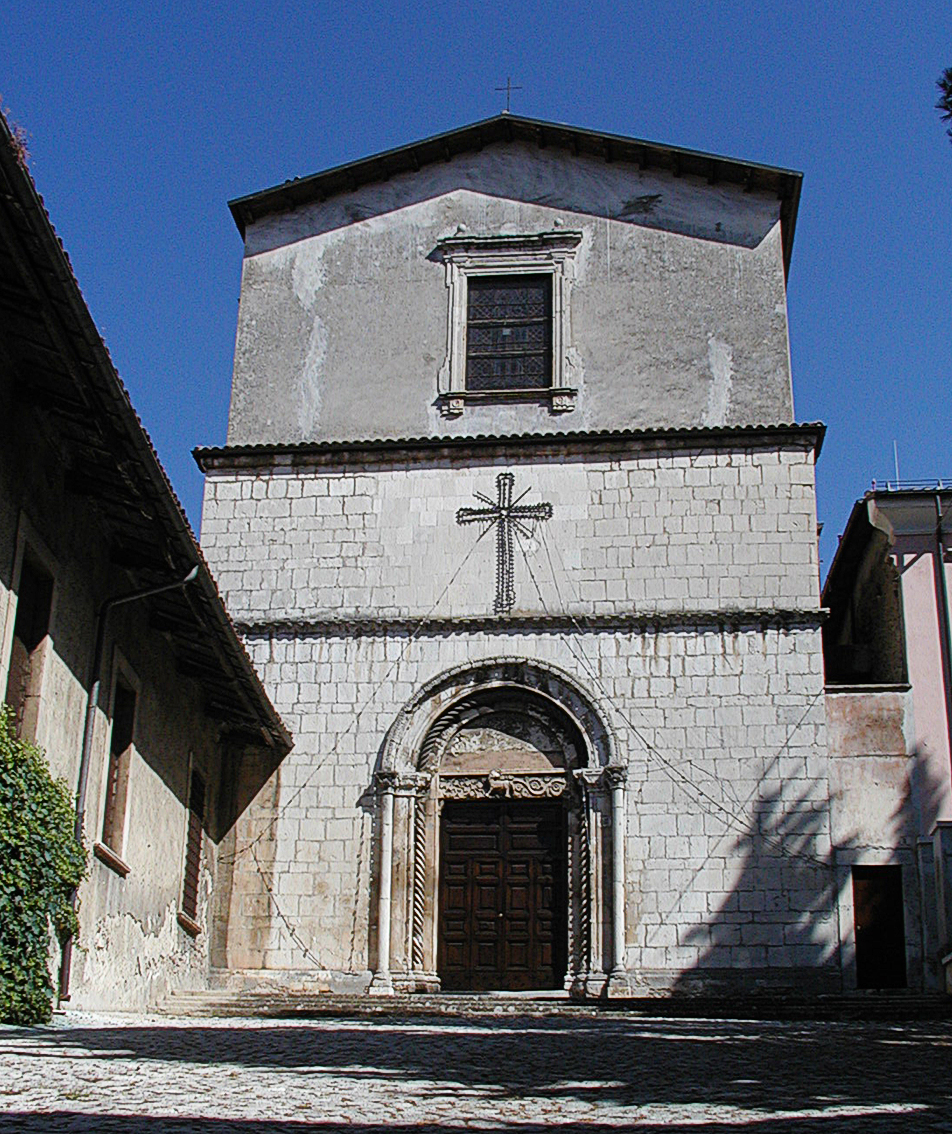 Chiesa di Santa Maria del Carmine, L'Aquila, Italia